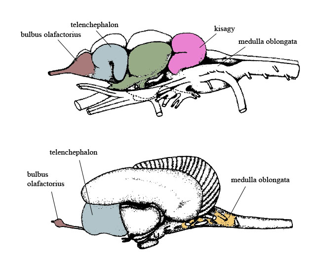 Kir